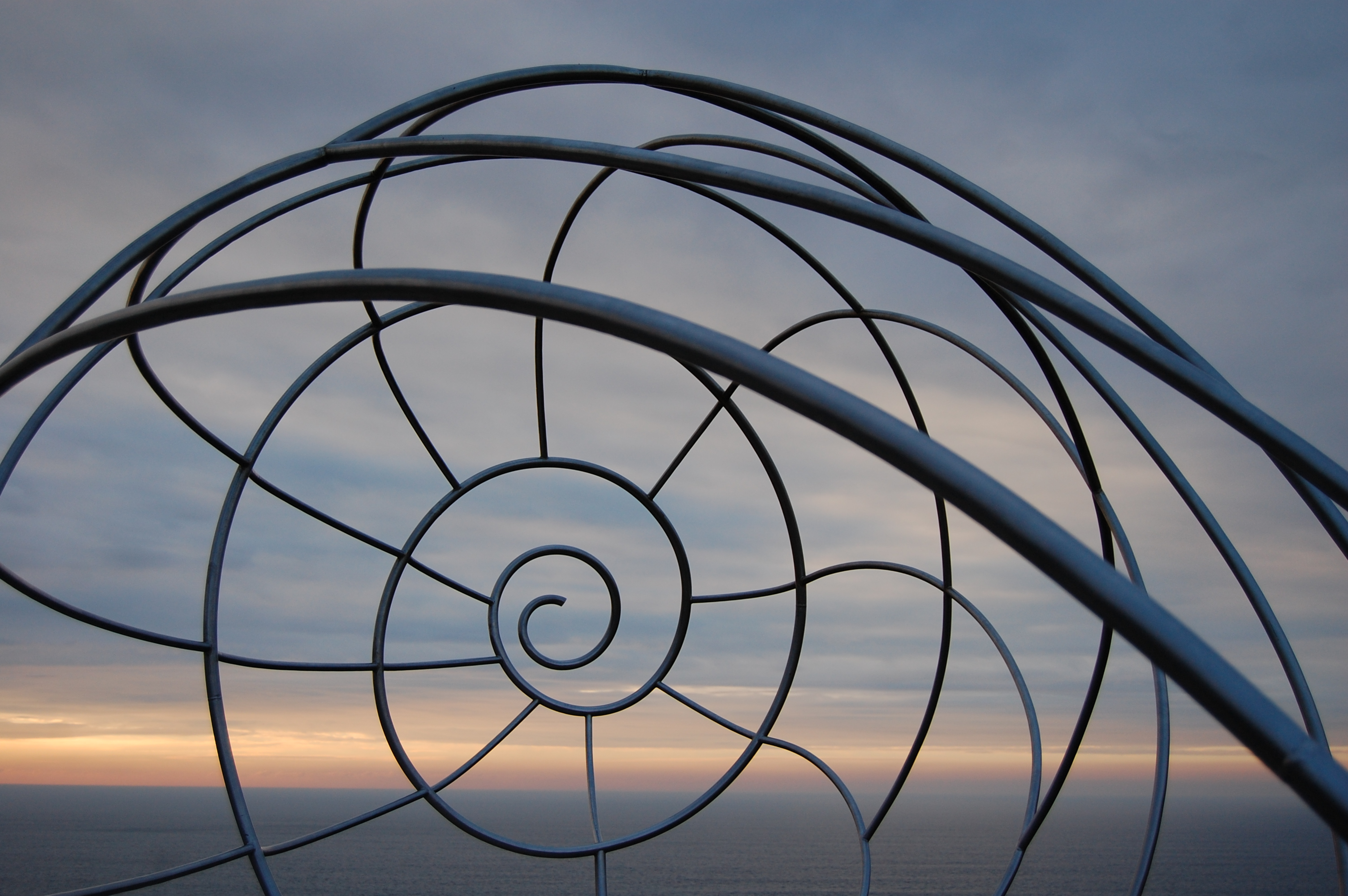 Escultura metálica no monte Facho de Donón (Cangas). O monte do Facho pertence ó Lugar de Importancia Comunitaria Costa da Vela. This is a photography of a Site of Community Importance in Spain with the ID: ES1140010. Natura2000 entry, EEA entry